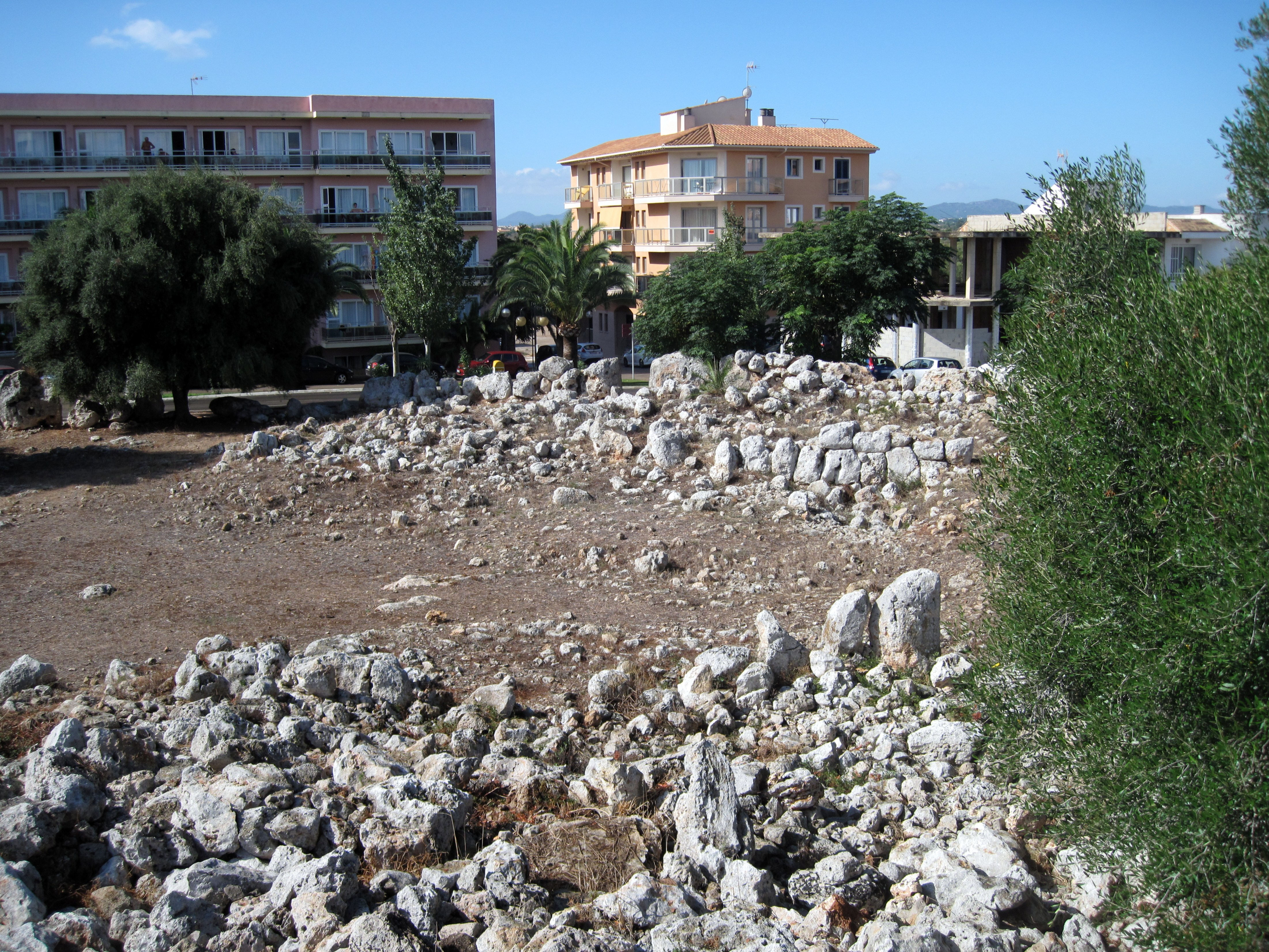 Fläche zwischen der obersten Ebene und der westlichen Großsteinmauer des talaiotischen Dorfes von S’Illot (Poblat talaiòtic de s’Illot), Gemeinde Sant Llorenç des Cardassar, Mallorca, Spanien